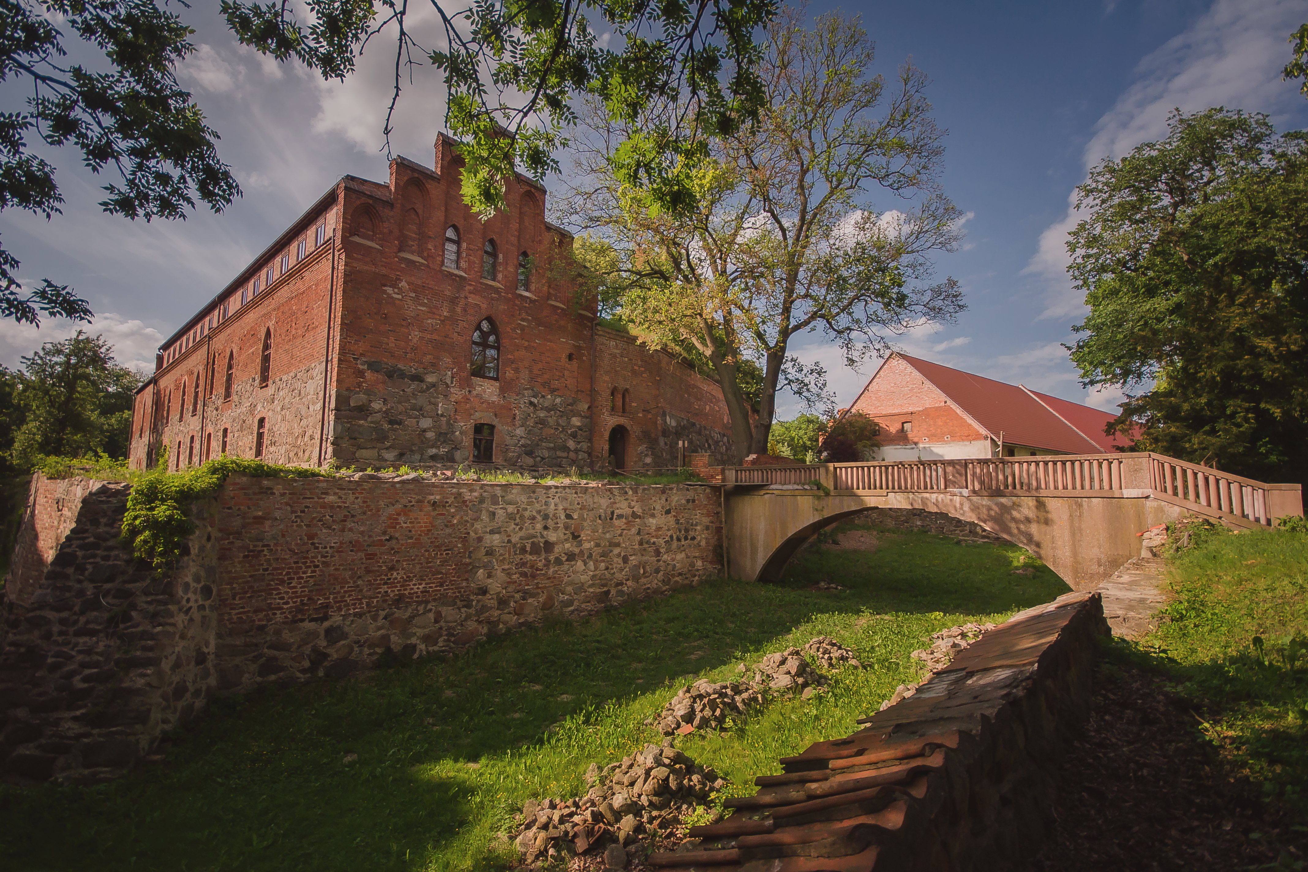 Zamek Bierzgłowski, Zamek krzyżacki, ob. diecezjalne centrum kultury, XIII/XIV